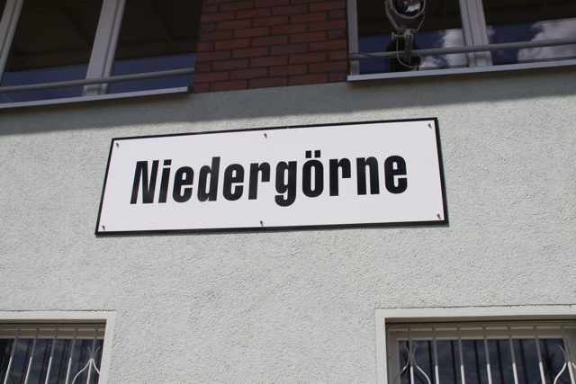 Bahnhofsschild Niedergoerne am Stellwerk